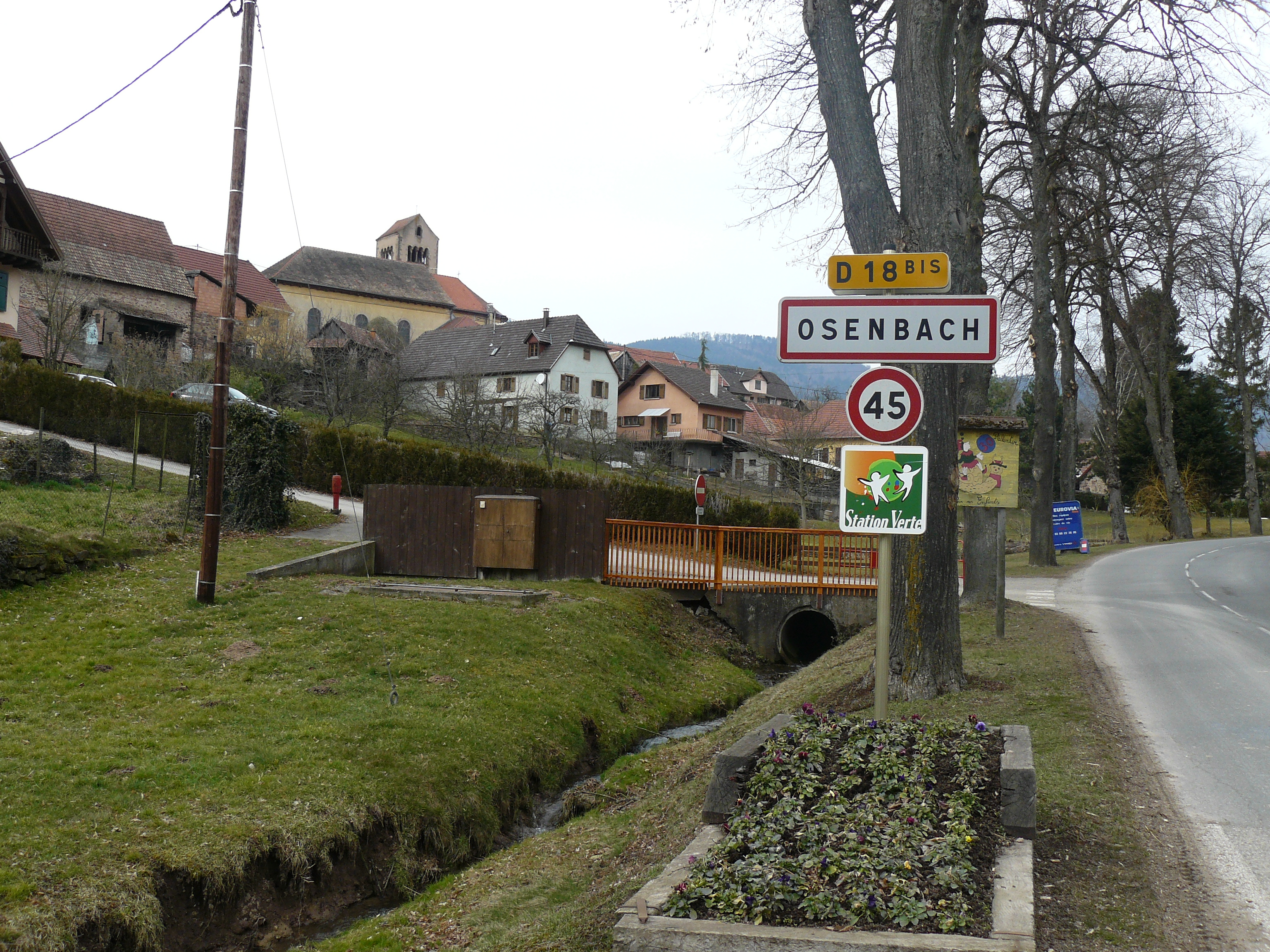 Entrée du village d'Osenbach en venant de Soultzmatt